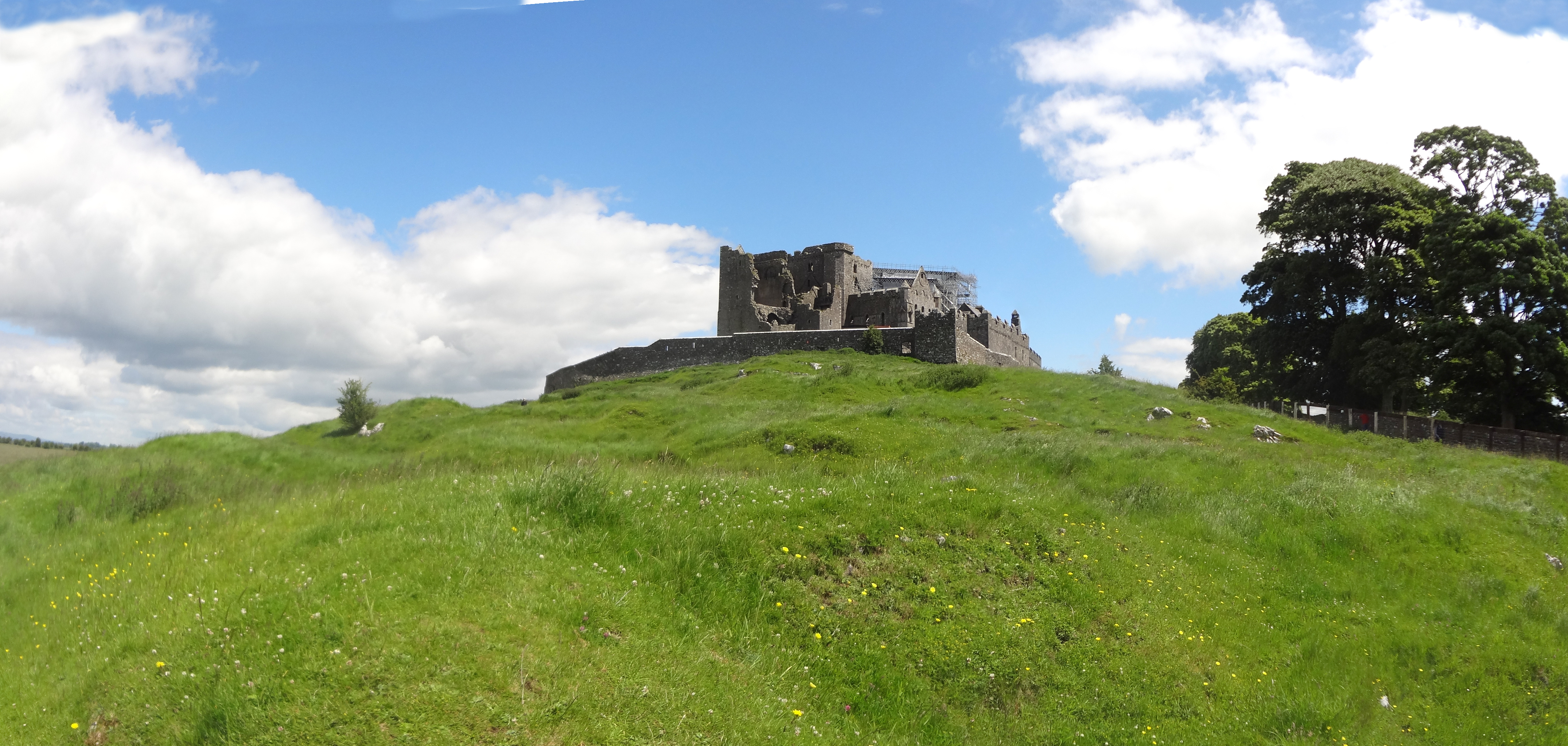 Rock of Cashel vu de l'ouest